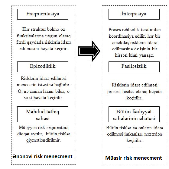 Risk menecment fərqləri